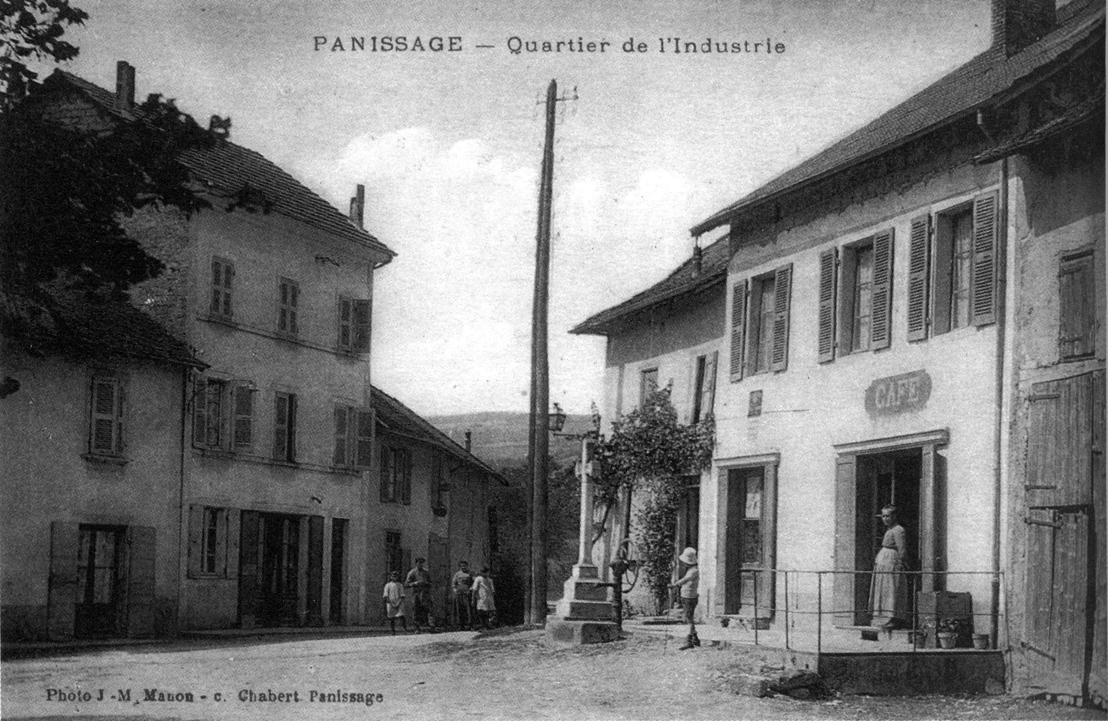 Panissage, quartier de l'industrie, vers 1920